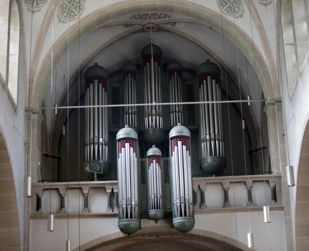 Orgel Pankratius